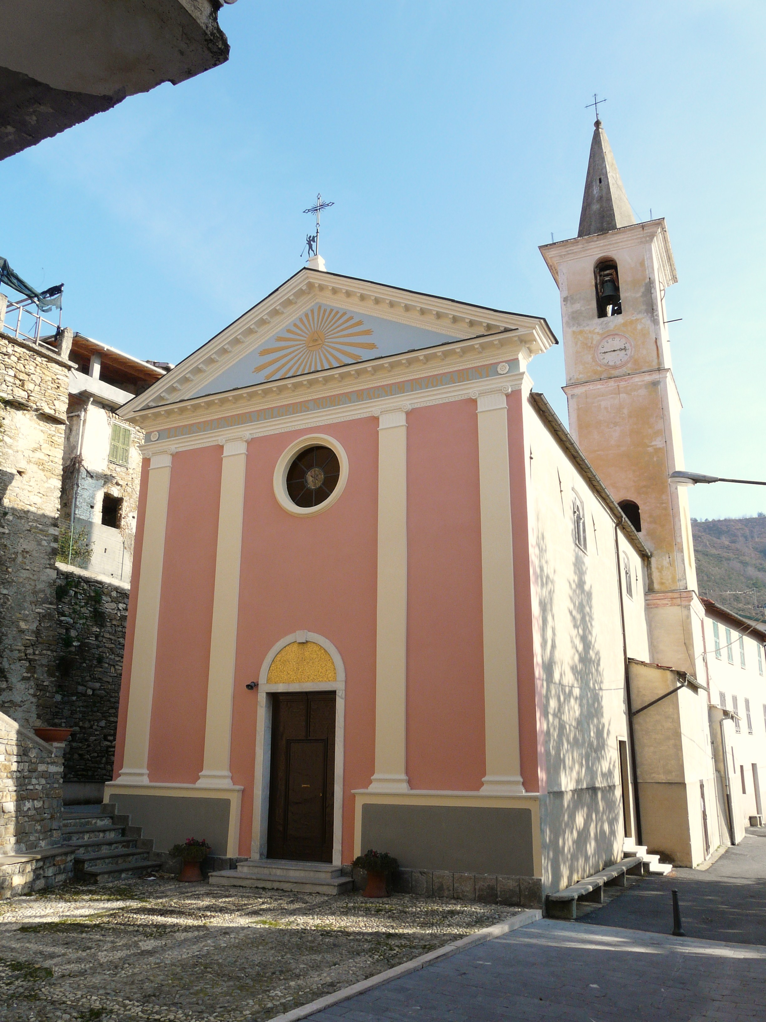 Chiesa di Santa Lucia, Cesio, Liguria, Italia